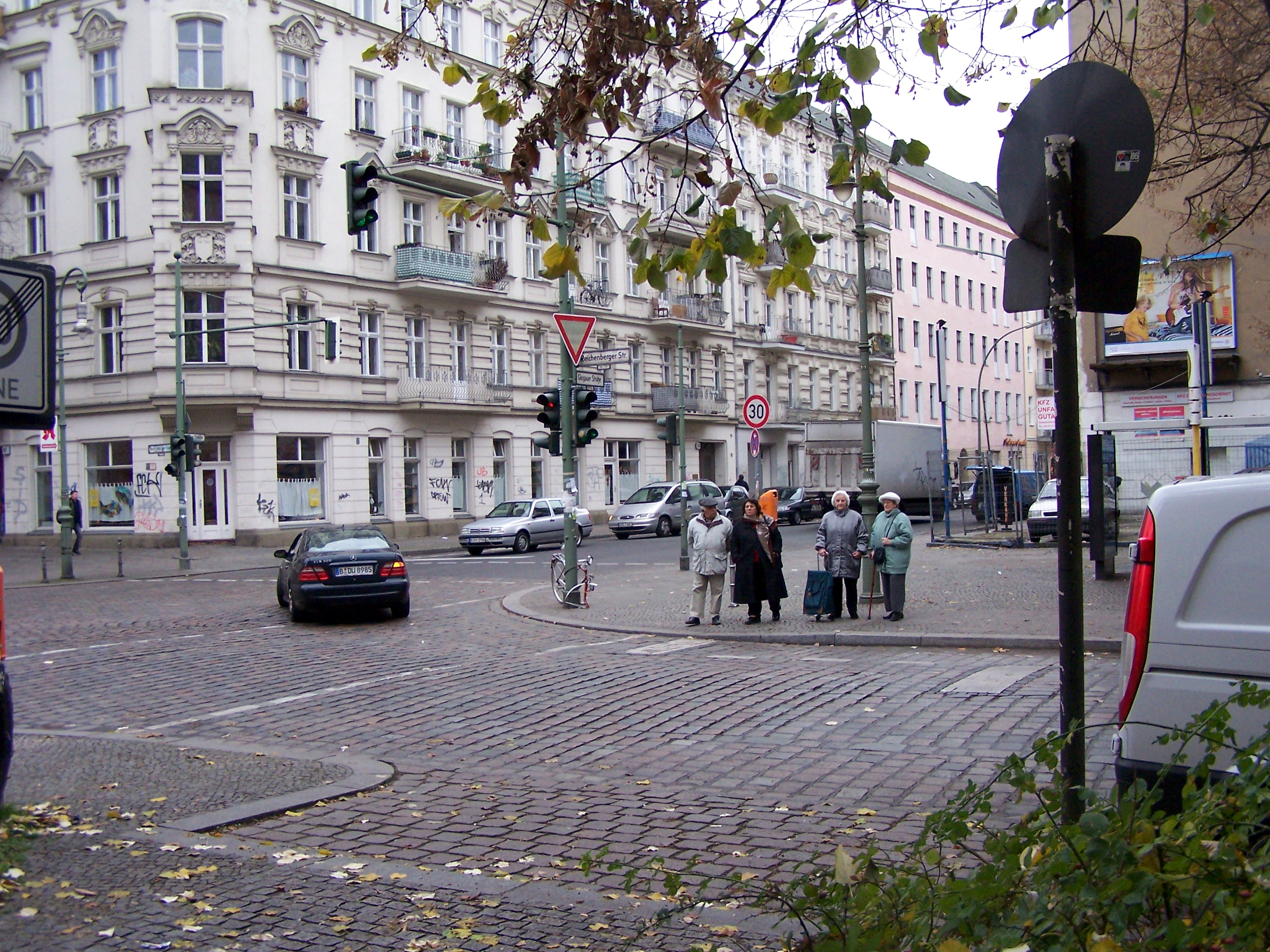 This Picture shows the Glogauer Straße crossing the Reichenberger Straße in Berlin-Kreuzberg. November 2005.